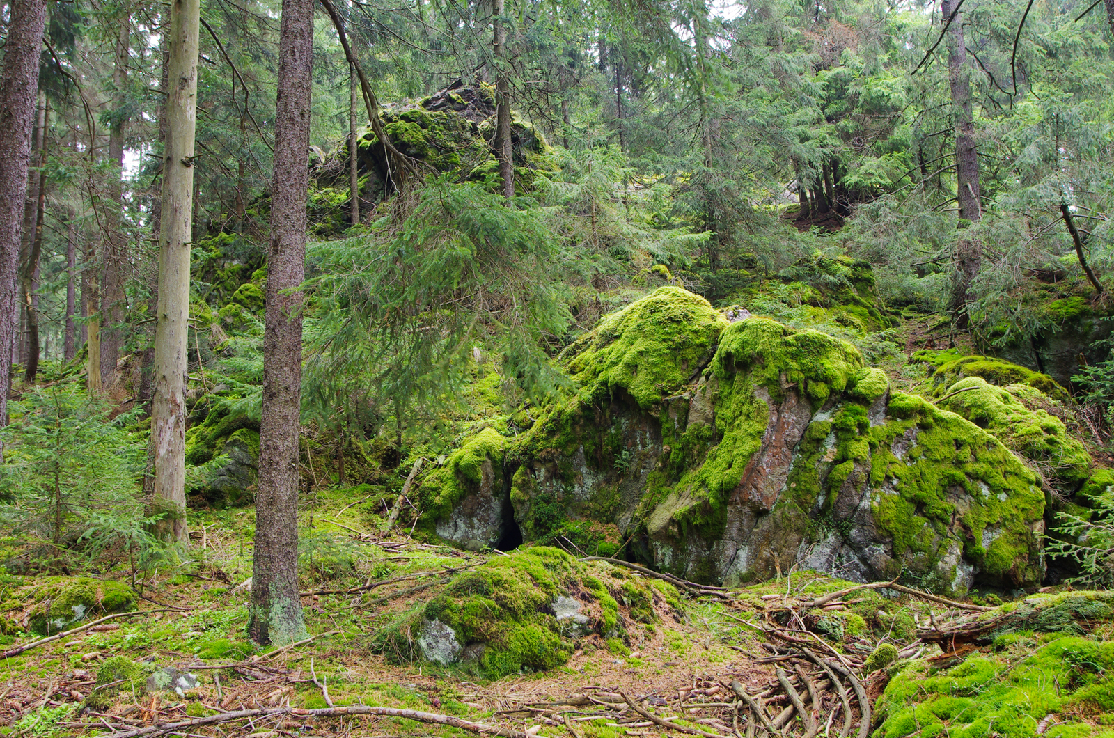 Medvědí rozhledy, Evropsky významná lokalita - Natura 2000, okres Sokolov